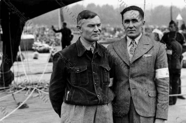 Bronisław (wówczas Wacław) Koblański i Stanisław Pantalan (1938) podczas zawodów o Puchar Gordona Bennetta 1938